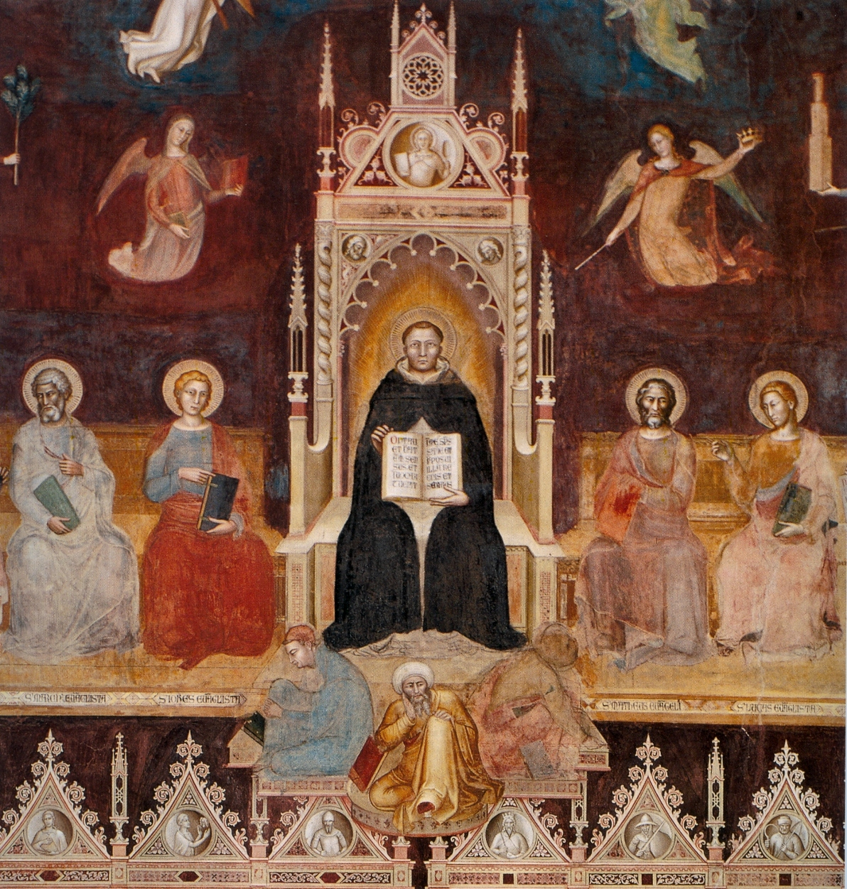 Santa_Maria_Novella_1366-7_fresco